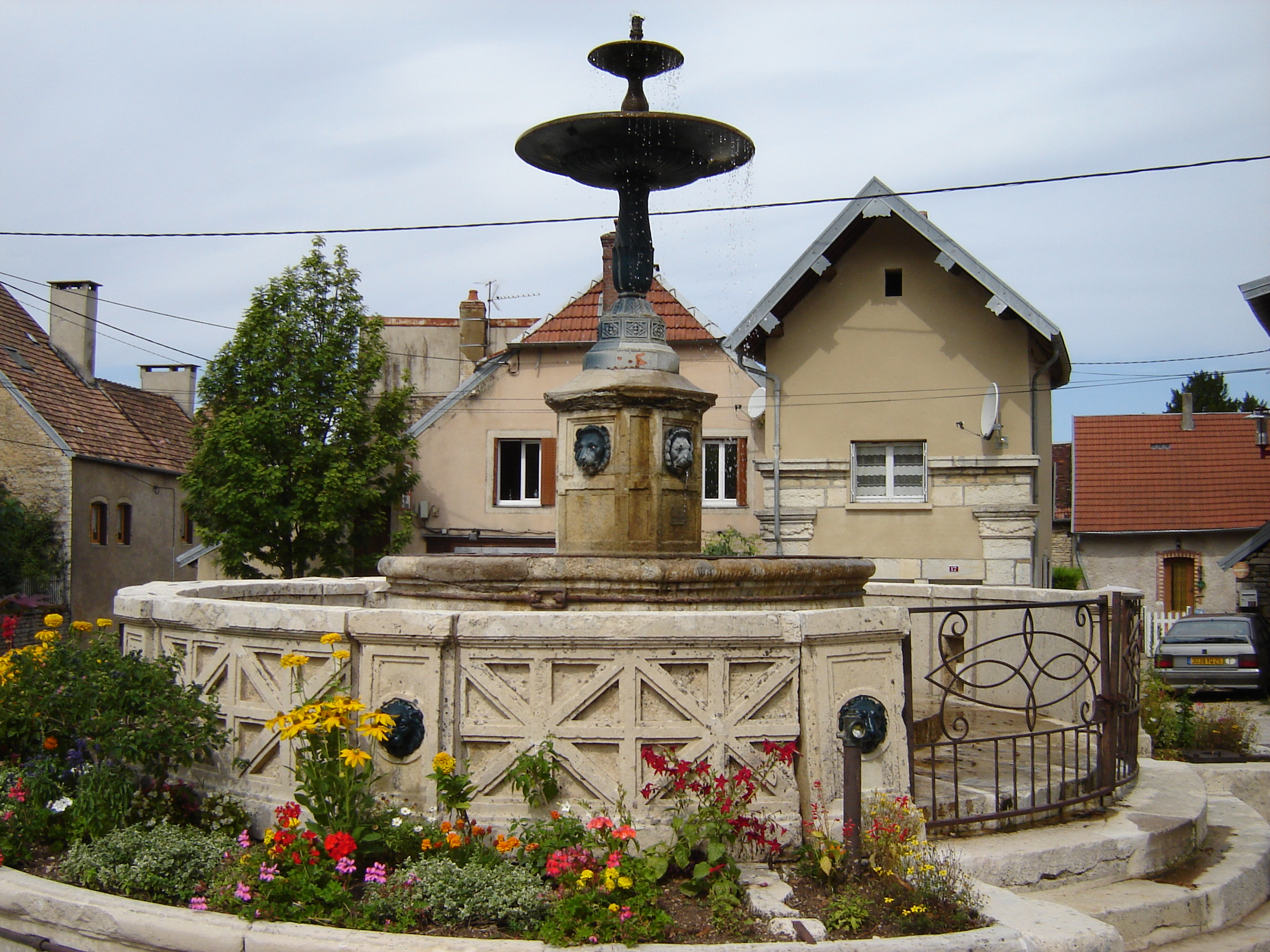 Fontaine de Byans sur Doubs, Place de l'église, 1846